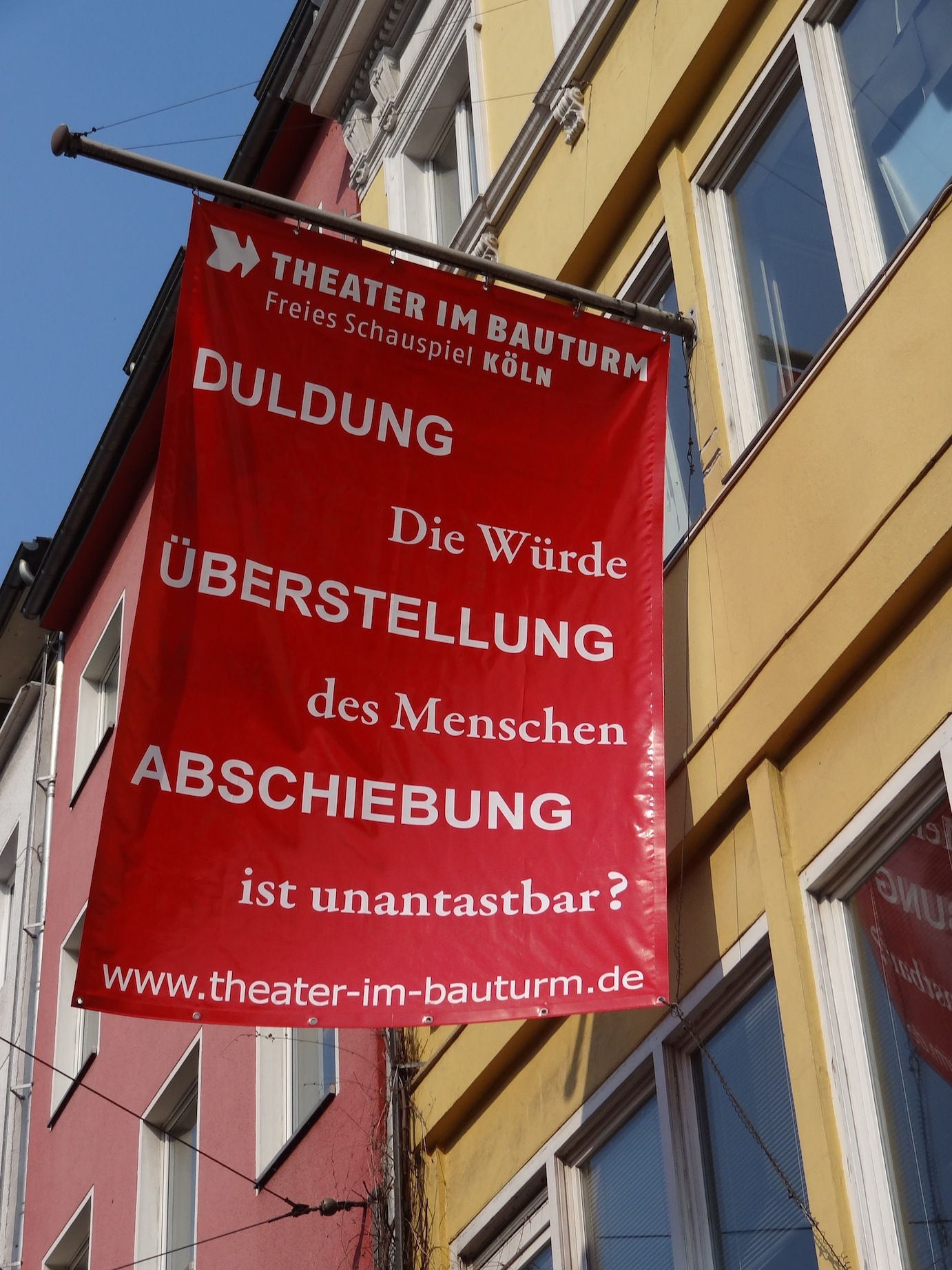 Außenfahne des Theaters im Bauturm, Köln, mit der Beschriftung anlässlich der Premiere von "Deportation Cast" im April 2013